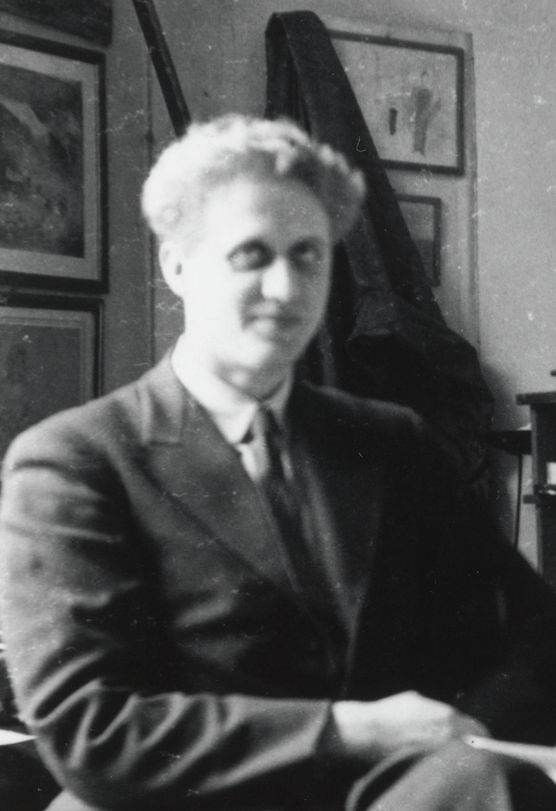 Bildet er hentet fra Nasjonalbibliotekets bildesamling Depicted people: Valen, Fartein and Valen-Sendstad, Magne